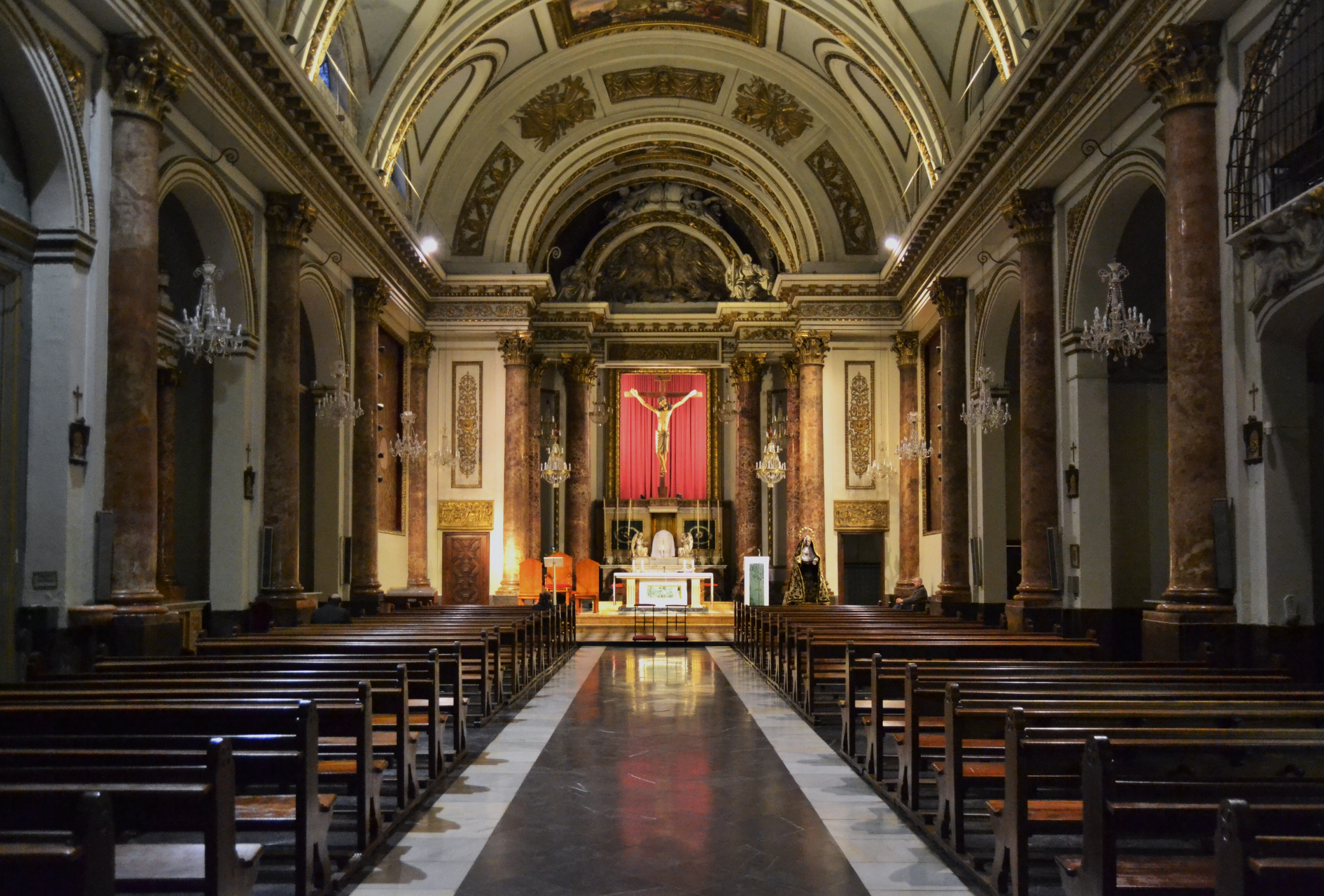 Interior de l'església del Salvador, València.